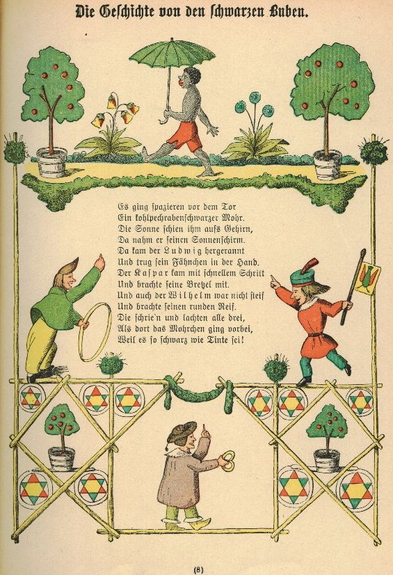 Der Struwwelpeter: Die Geschichte von den schwarzen Buben Tafel 1